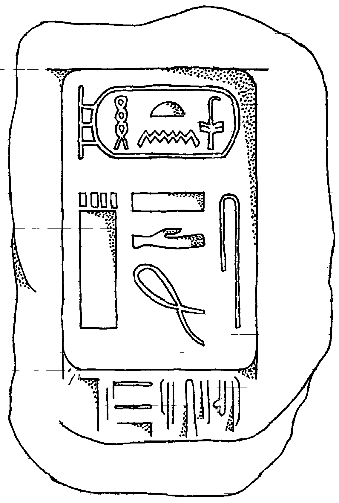 Granit cone of king Huni from Elephantine